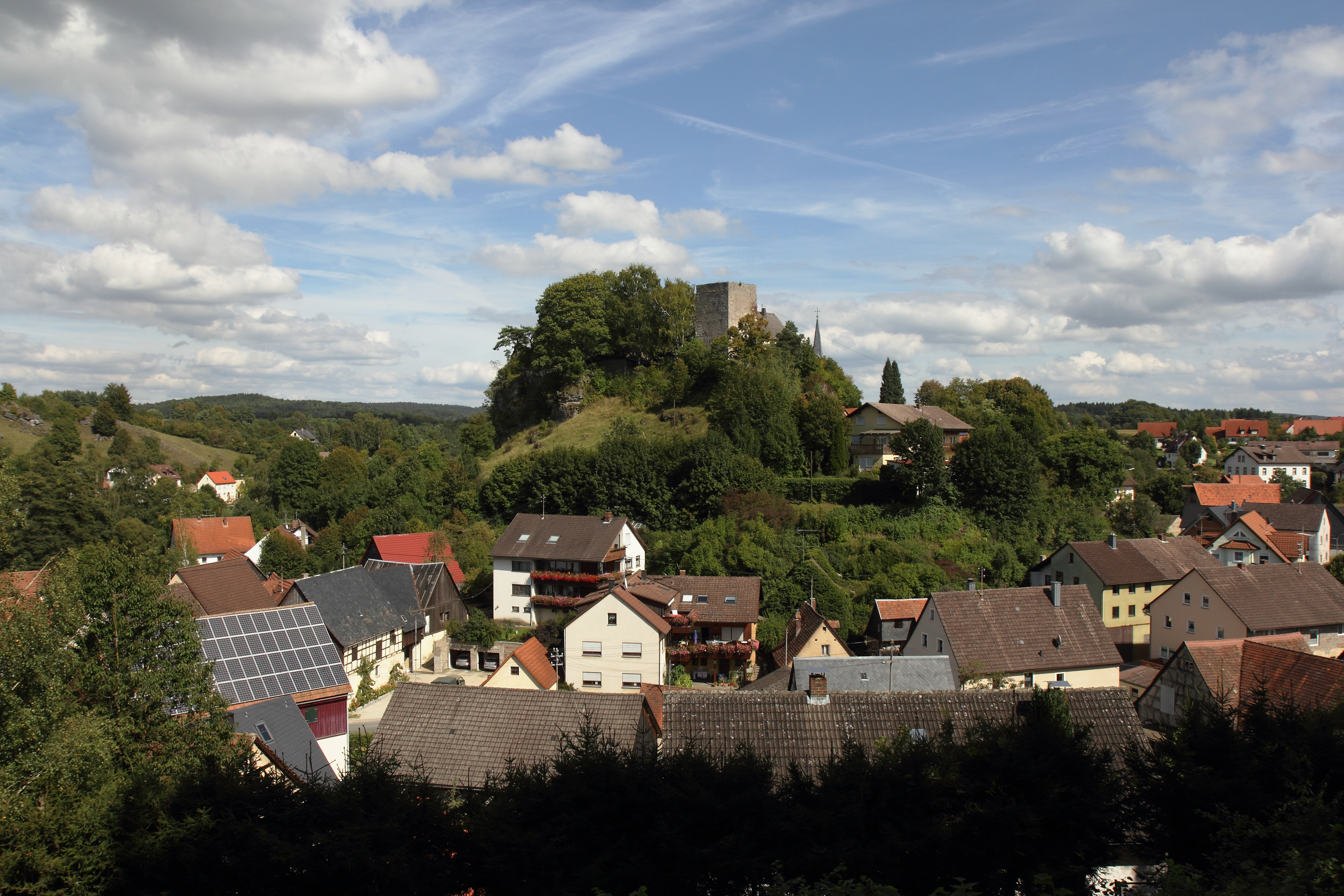 Burg Thuisbrunn - Ansicht der Ruine mit dem Bergfried aus westlicher Richtung